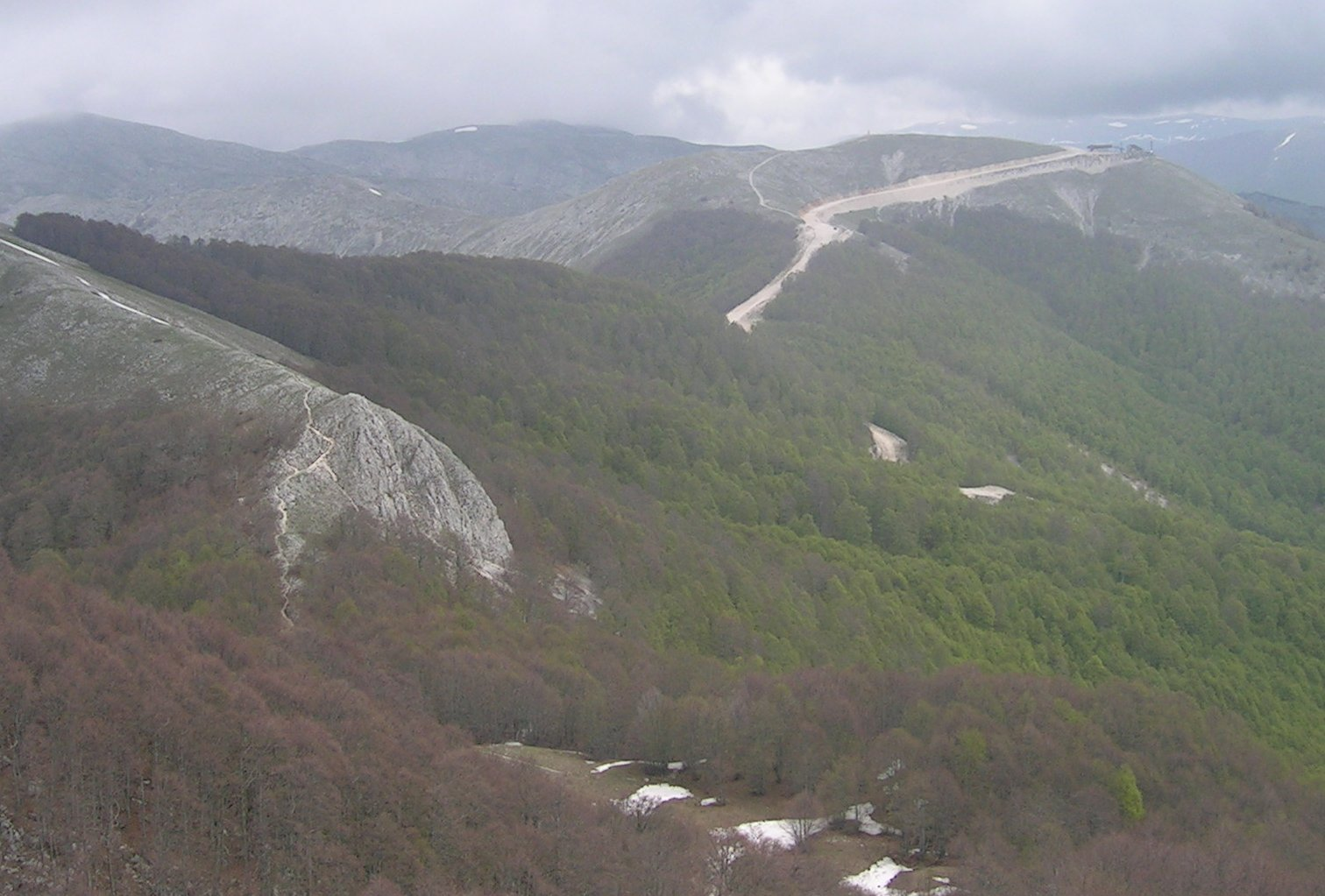 View from Valico Valcallano, Pescasseroli AQ